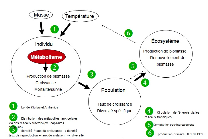 Le métabolisme et ses intéractions